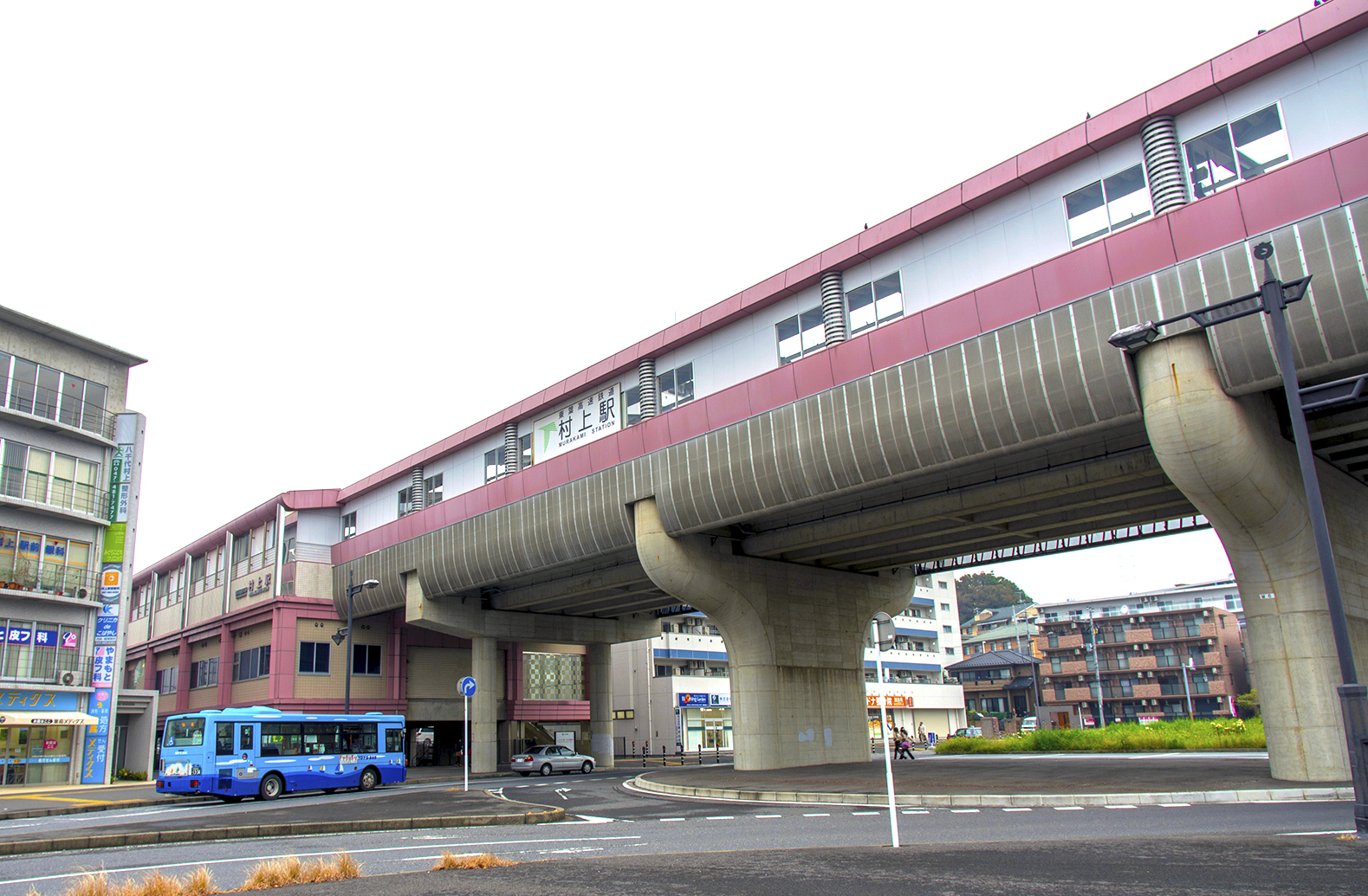 東葉高速鉄道株式会社東葉高速線村上駅